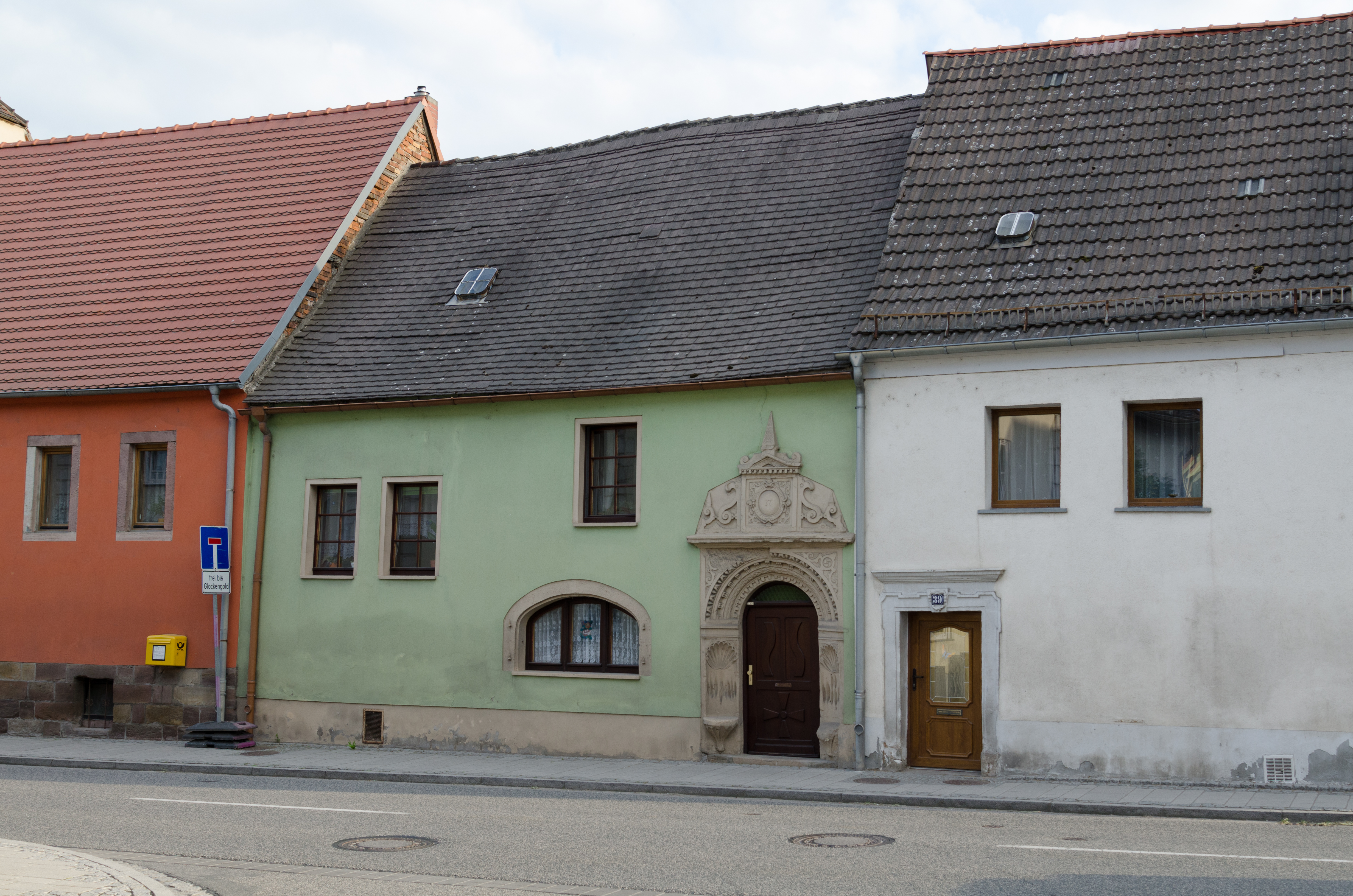 Laucha an der Unstrut, Obere Hauptstraße 37